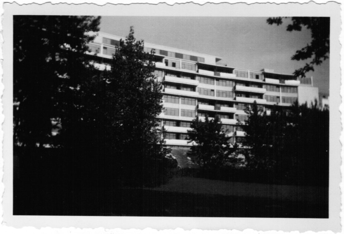 Internationale Bauausstellung in Berlin im Jahr 1957. Beitrag von Gropius